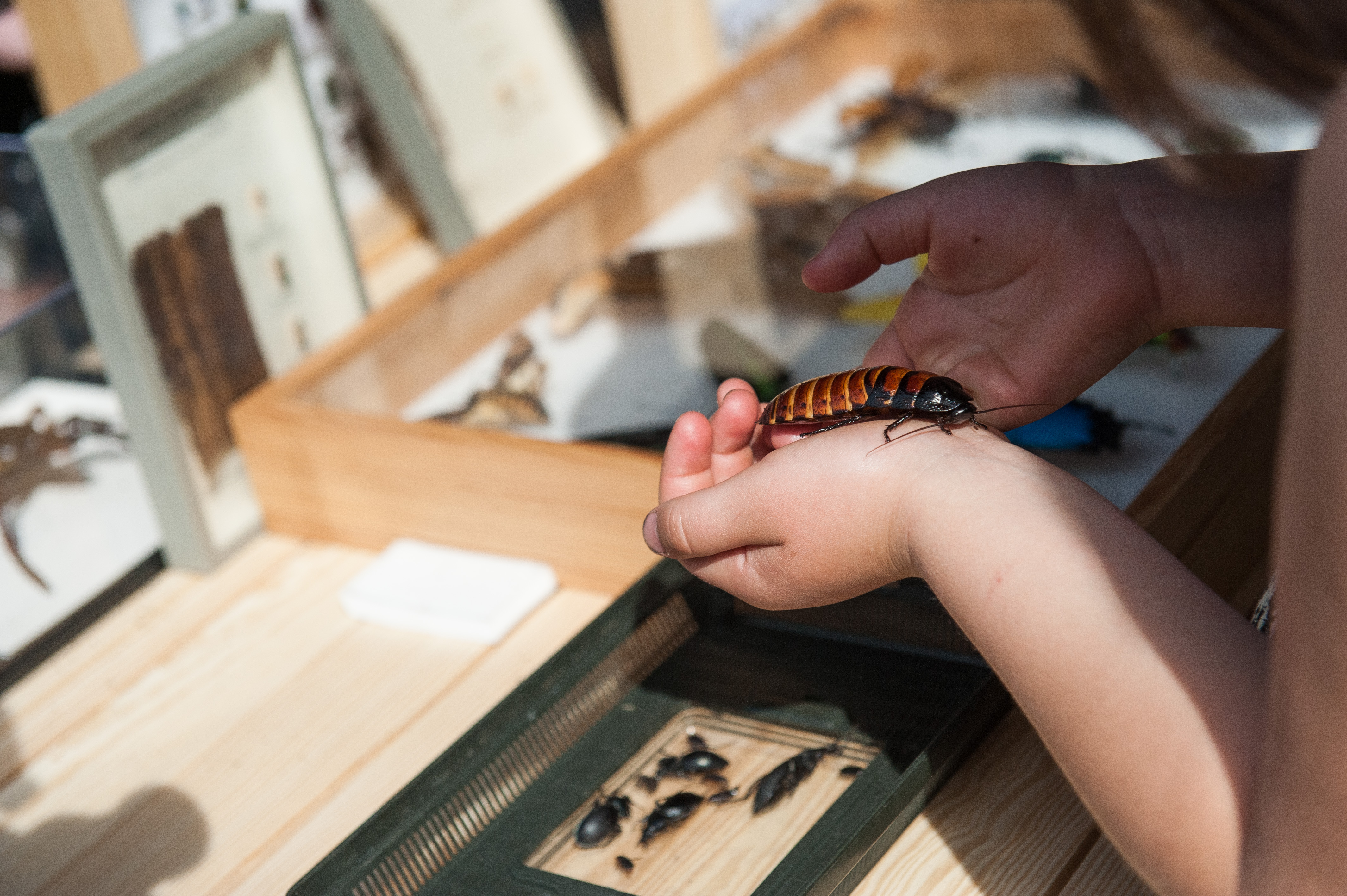 09.06.2018 WARSZAWA PRAGA - PGE STADION NARODOWY - 22 PIKNIK NAUKOWY - STOISKO D9 LASY PAŃSTWOWE